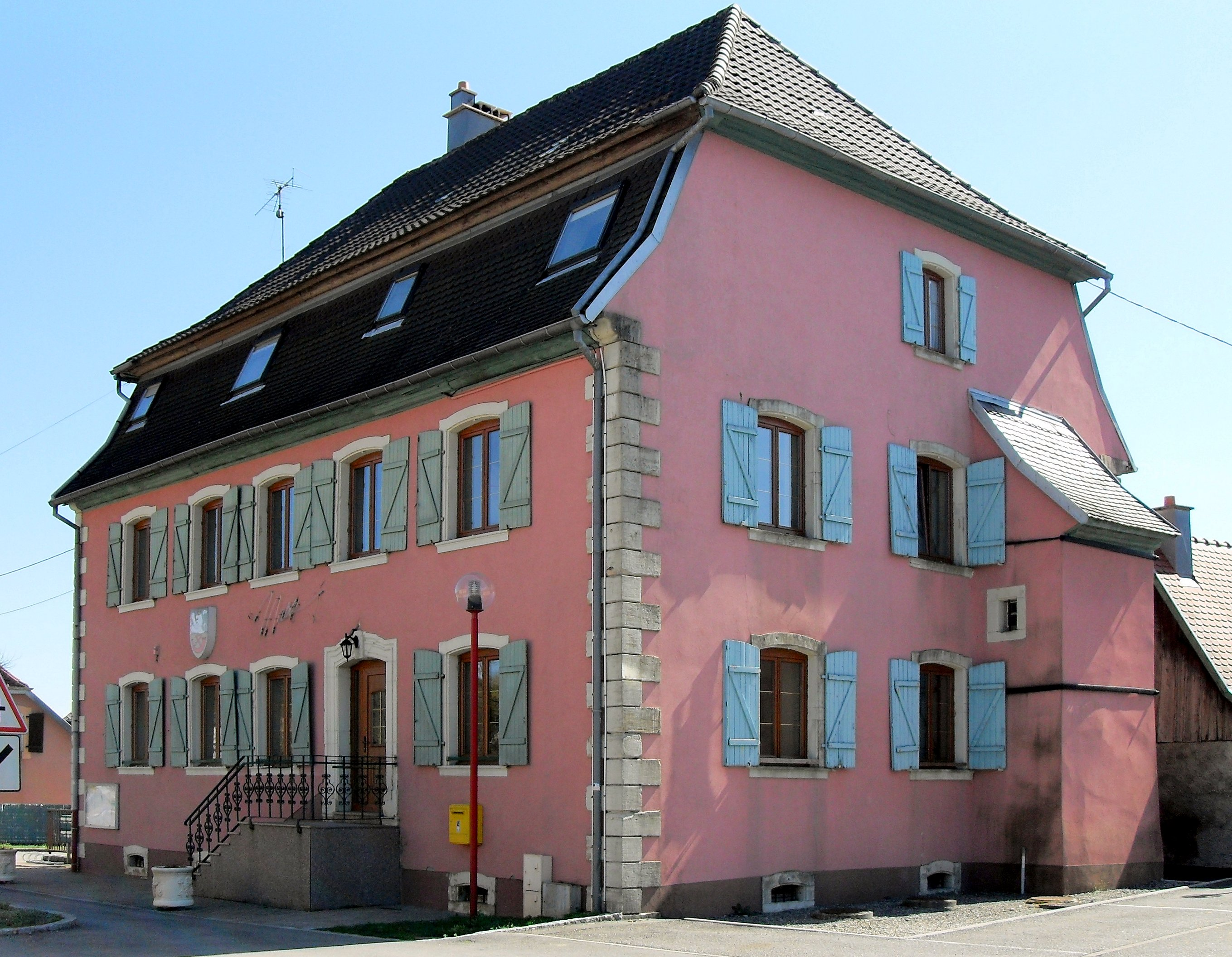 La mairie de Soppe-le-Bas